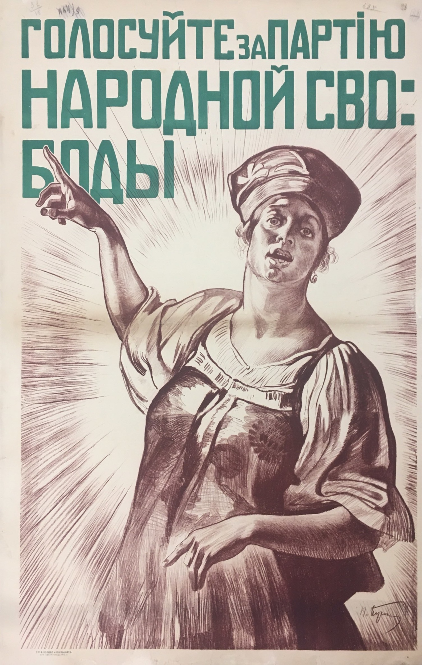 Голосуйте за партiю Народной свободы. Издательство: Т-во Р.Голике и Вильборгъ